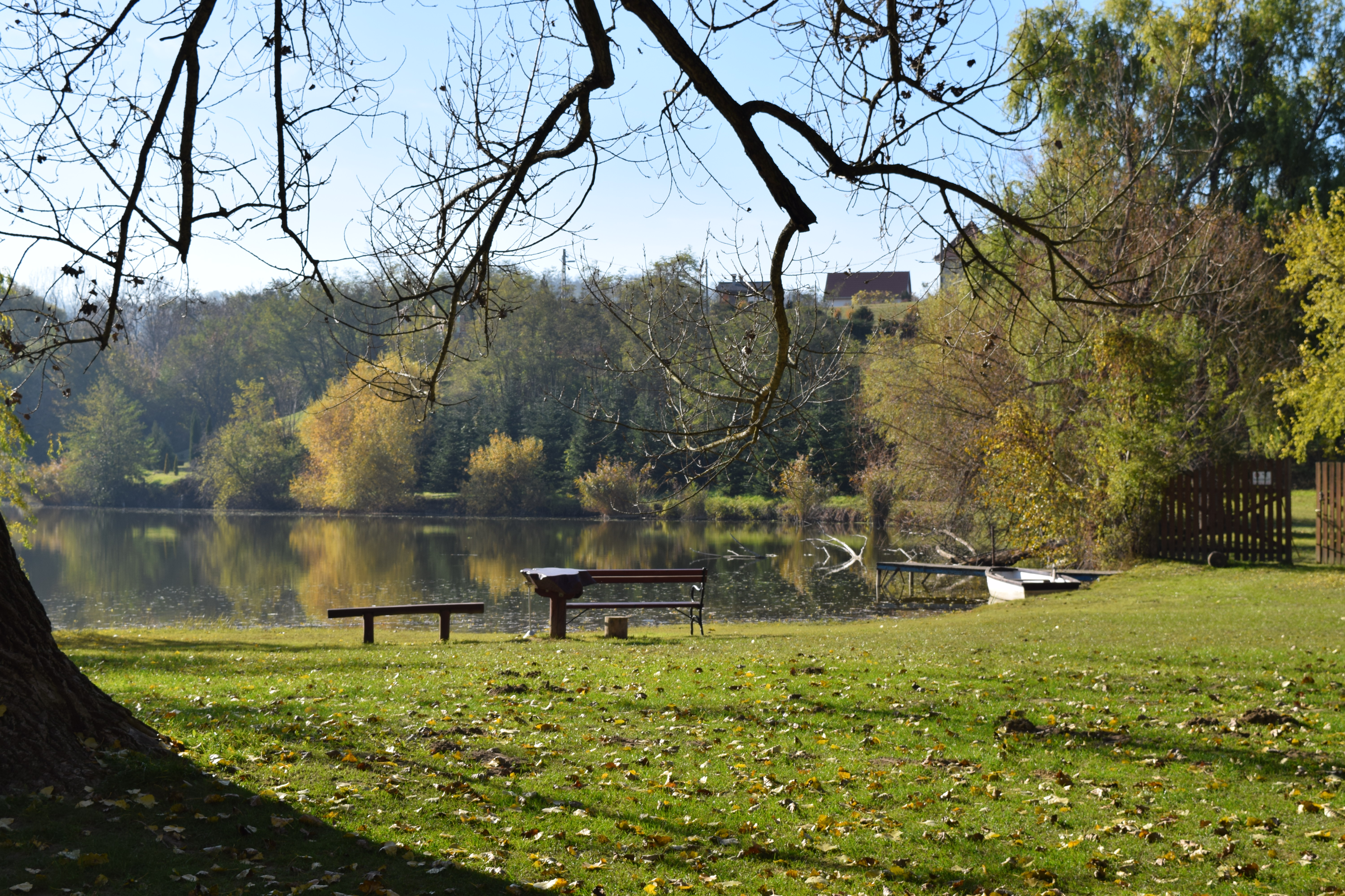 A Füzes tavat körülölelő park